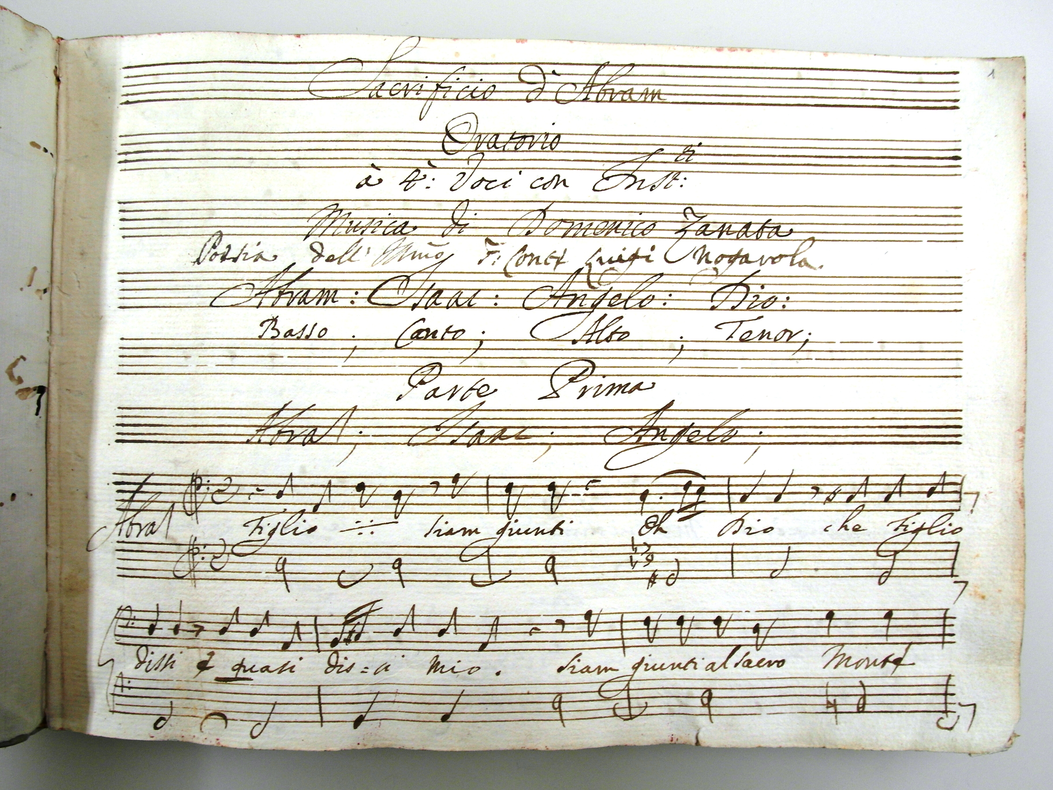 Frontespizio della partitura "Sacrificio d'Abram" di Domenico Zanatta, conservato presso la Biblioteca Civica di Verona Ms.1481 Cl. Arti Ubic. 90.9